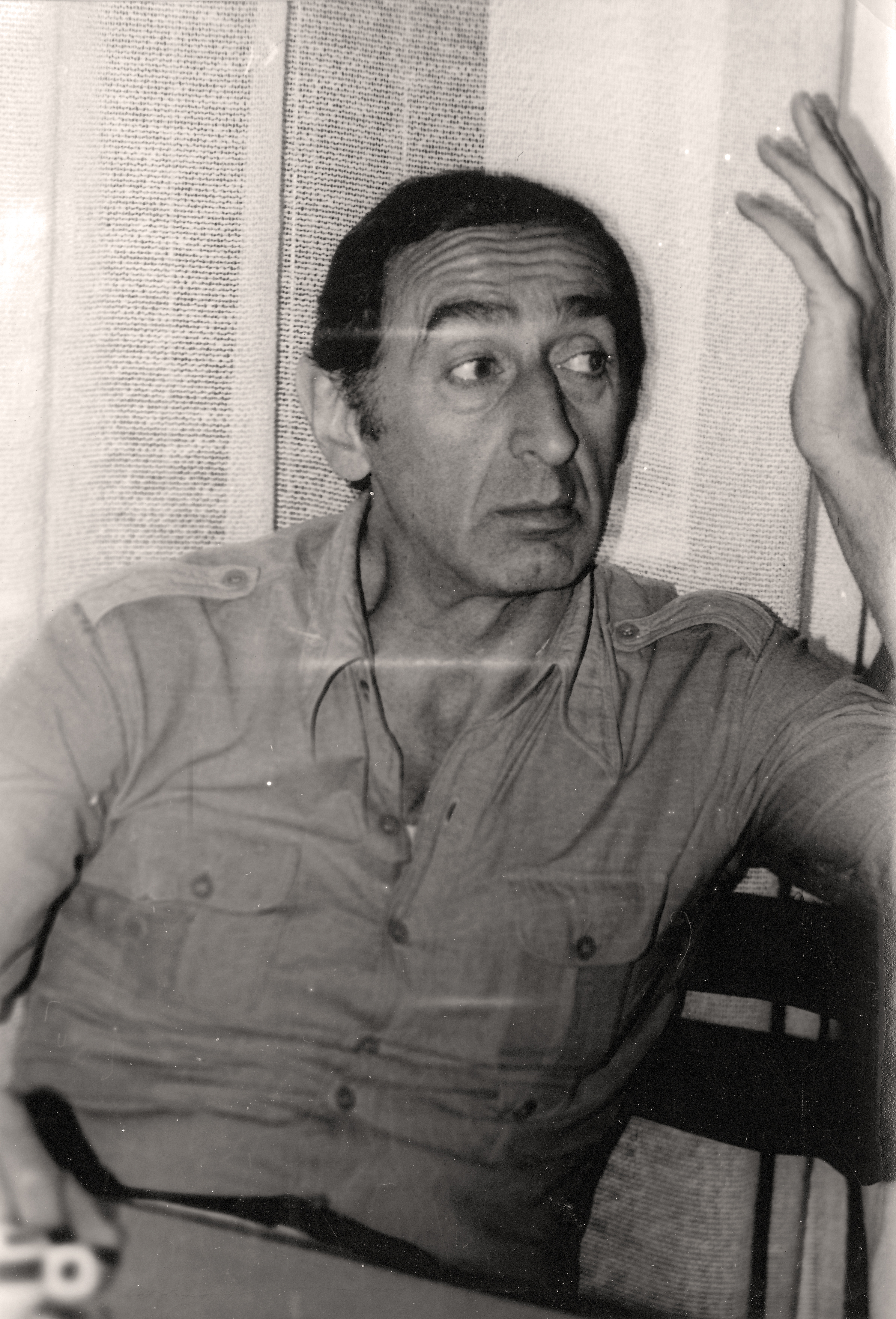 Predrag Preža Milinković na Filmskim susretima u Nišu 1984. godine